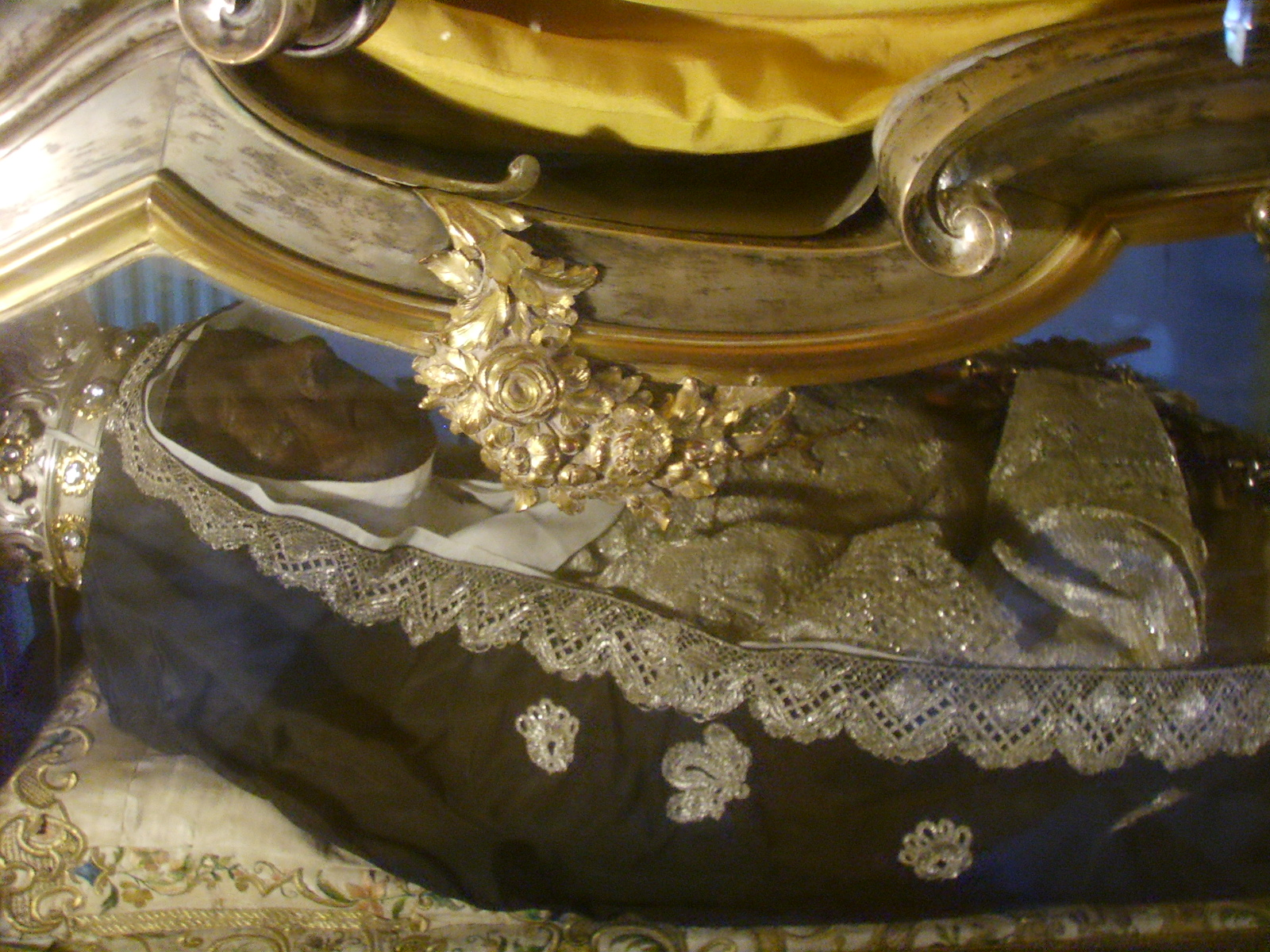 Basilica_di_Santa_Caterina_de'_Ricci